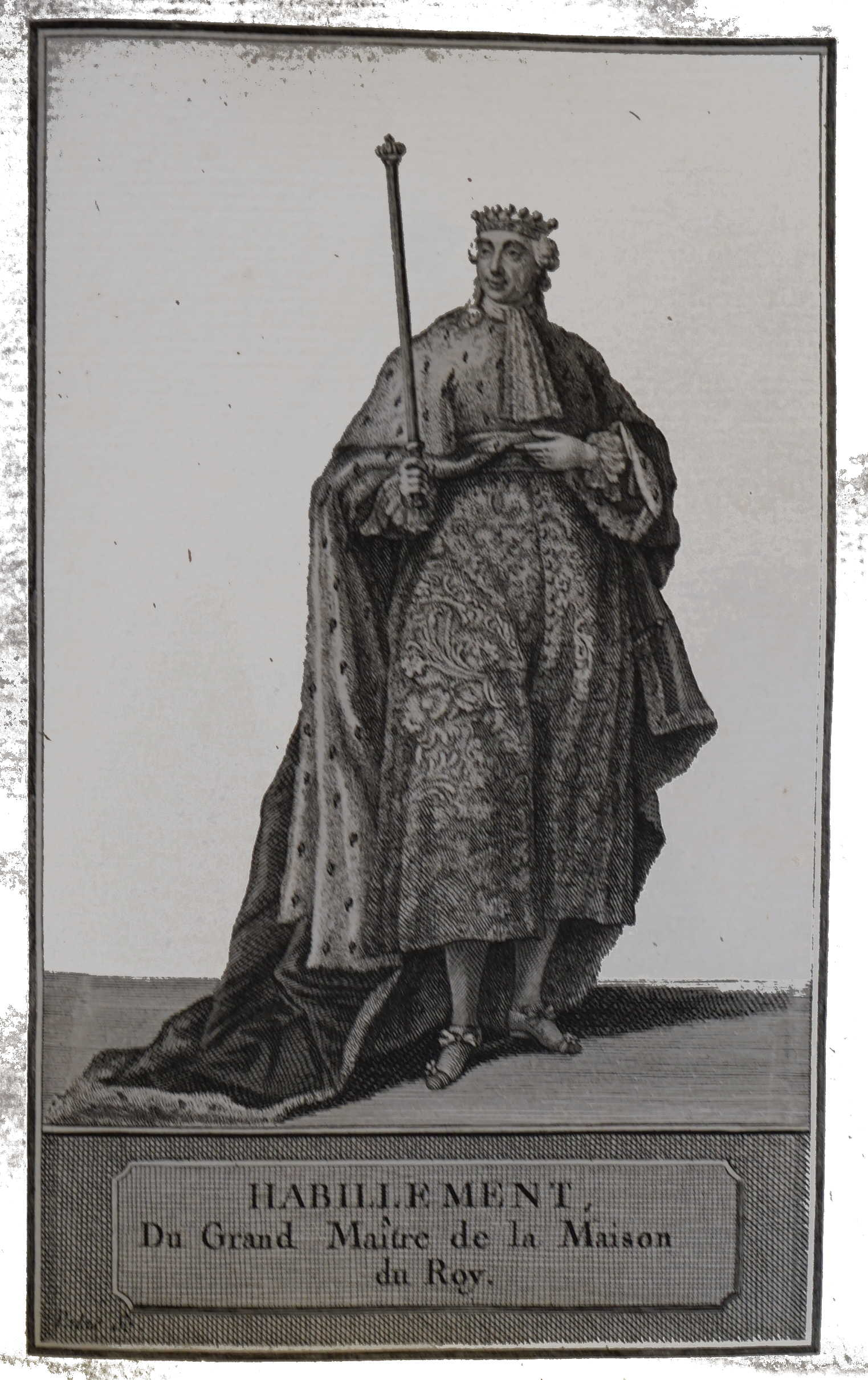 extrait du livre "Sacre et couronnement de Louis XVI ...".